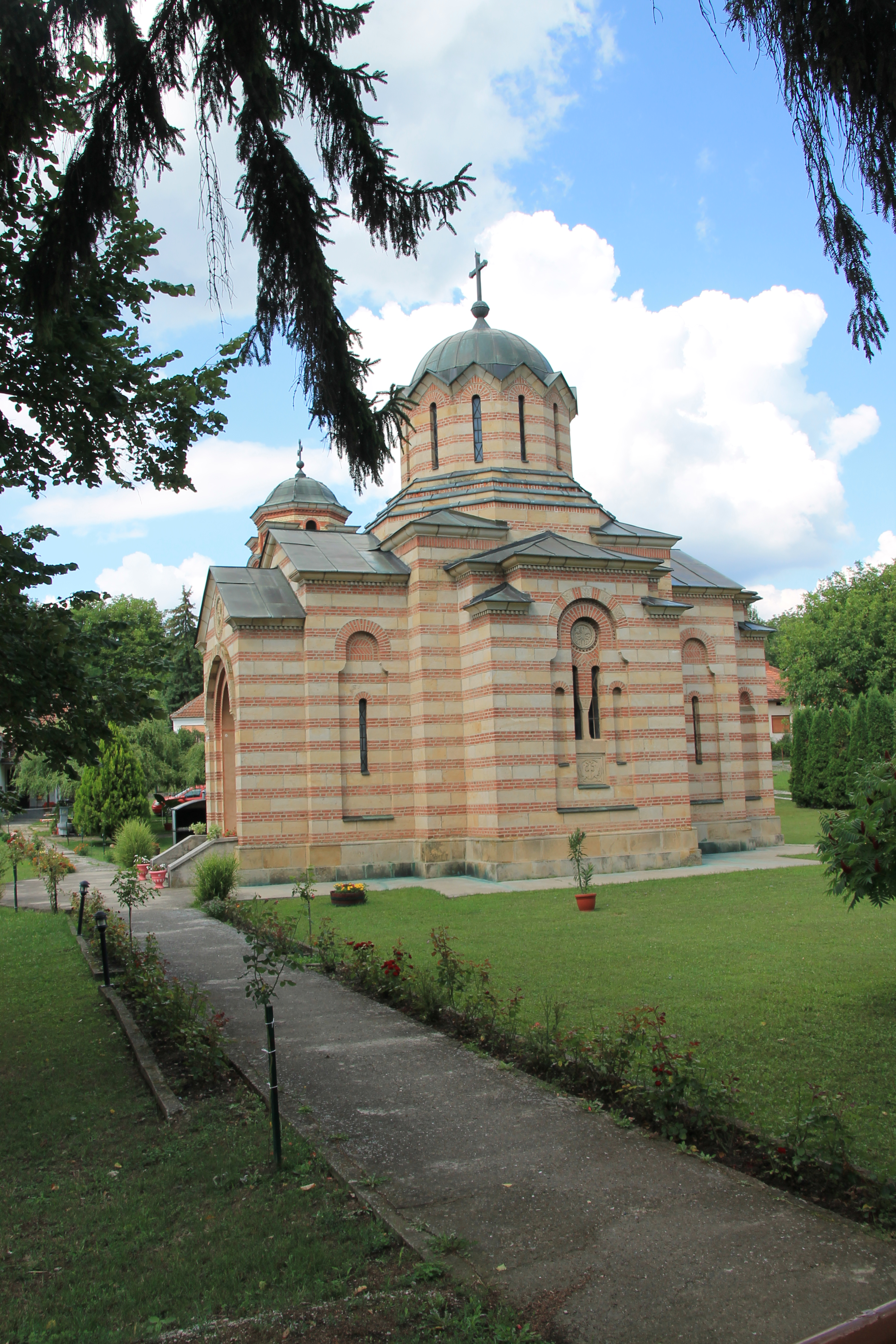 Crkva Sv. Konstantina i Jelene (Oparić)